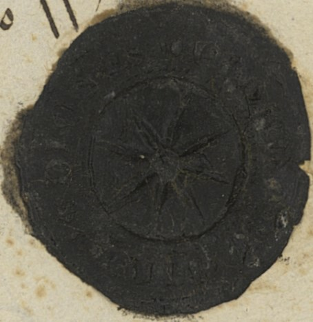 Archiv města Brna, Sbírka listin, mandátů a listů, inv. č. 1142, pečeť Dědice, rok 1524